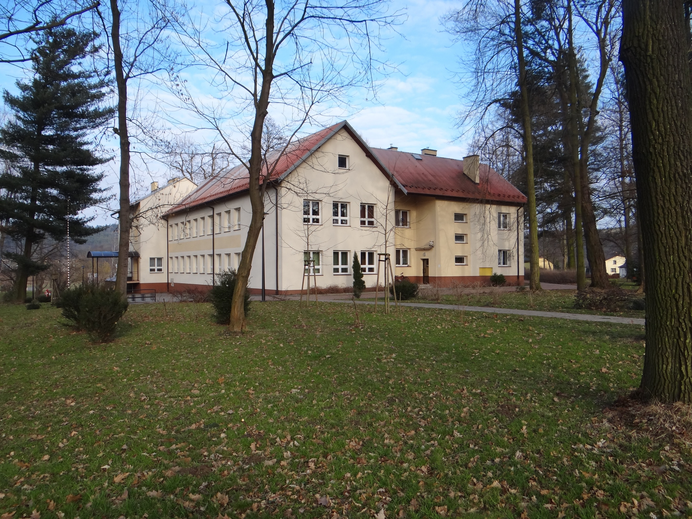 Bogoniowice, szkoła w parku dworskim